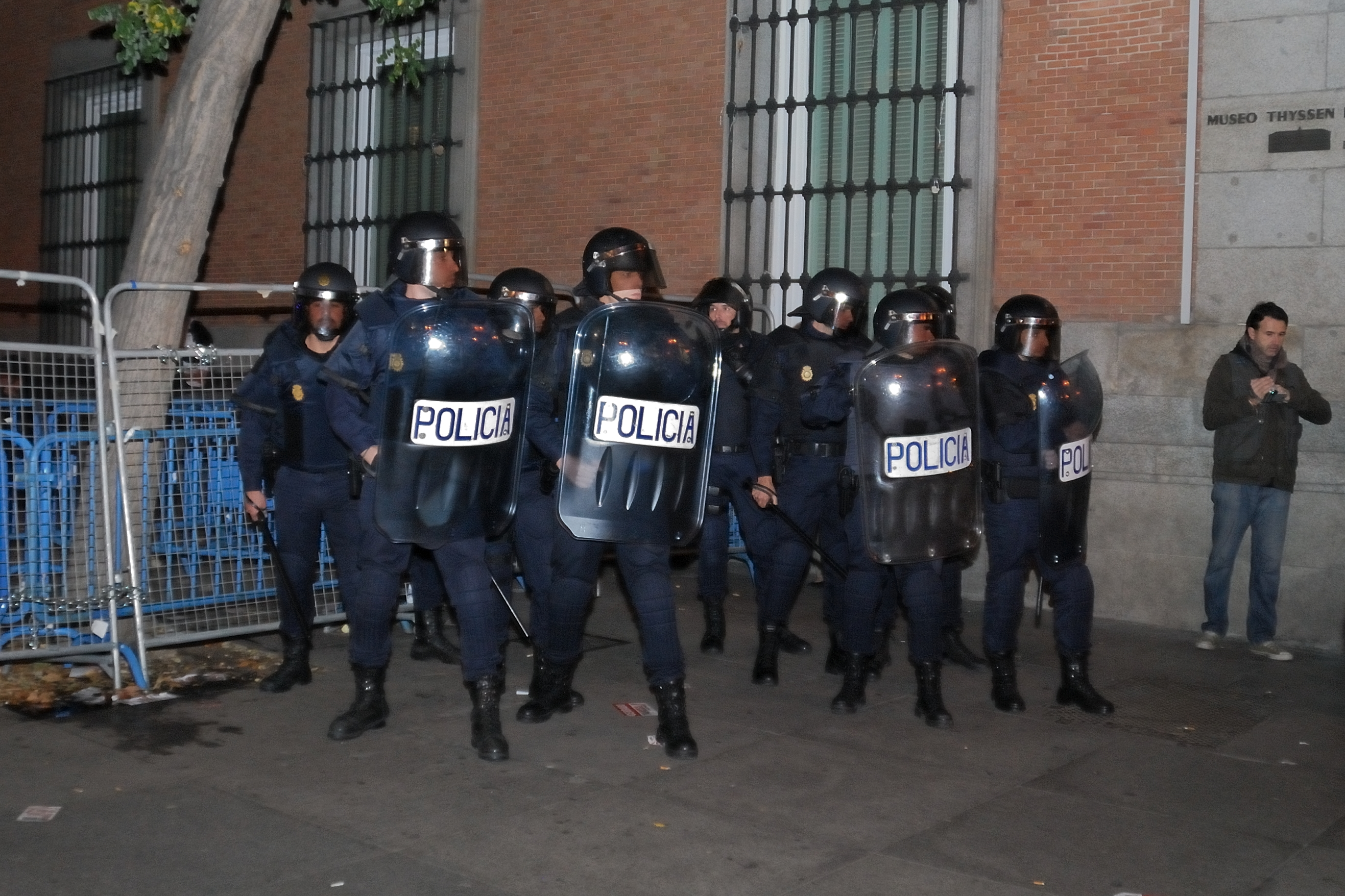 Incidentes durante la Huelga General del 14, despues de la manifestación que ha recorrido el centro de Madrid la policia ha intentado desalojar varias calles y se han producido enfrentamientos con los manifestantes, que han montado barricadas y las incendiado.